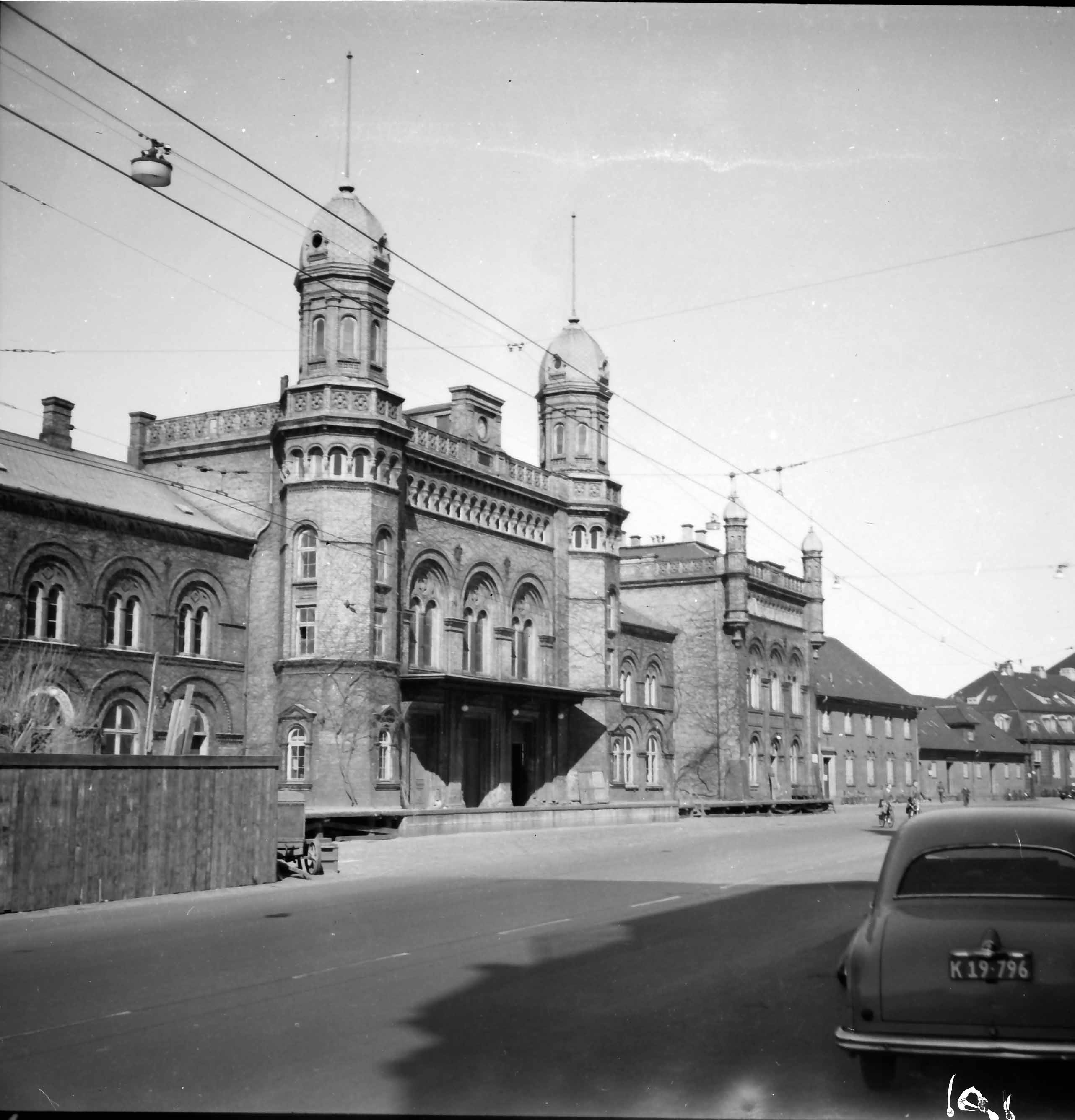 Den nu nedrevne vestbanegård på Stationsvej i Odense.